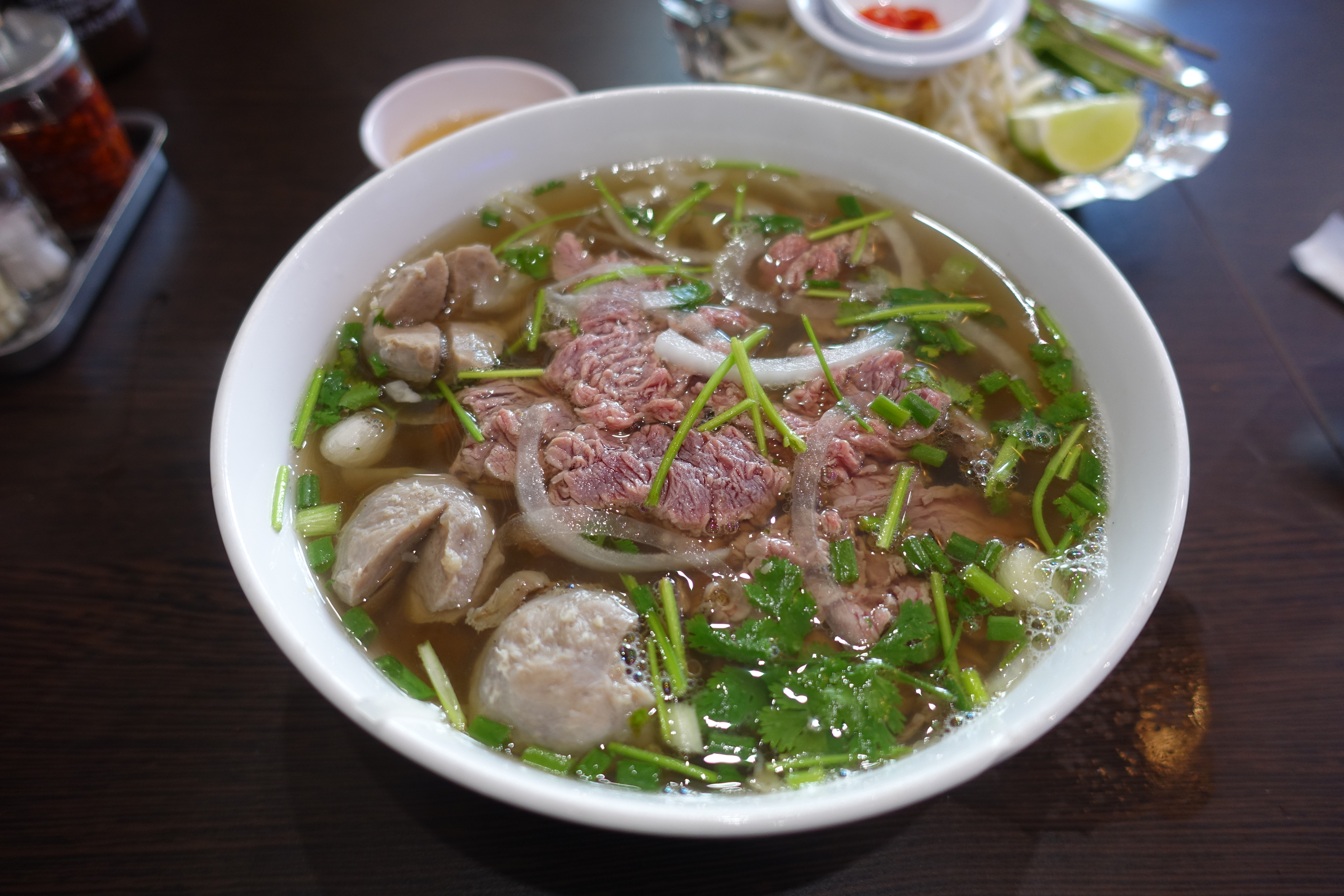 Pho @ Song Huong @ Paris